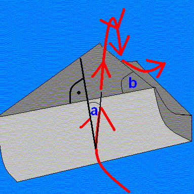 Cornerjump